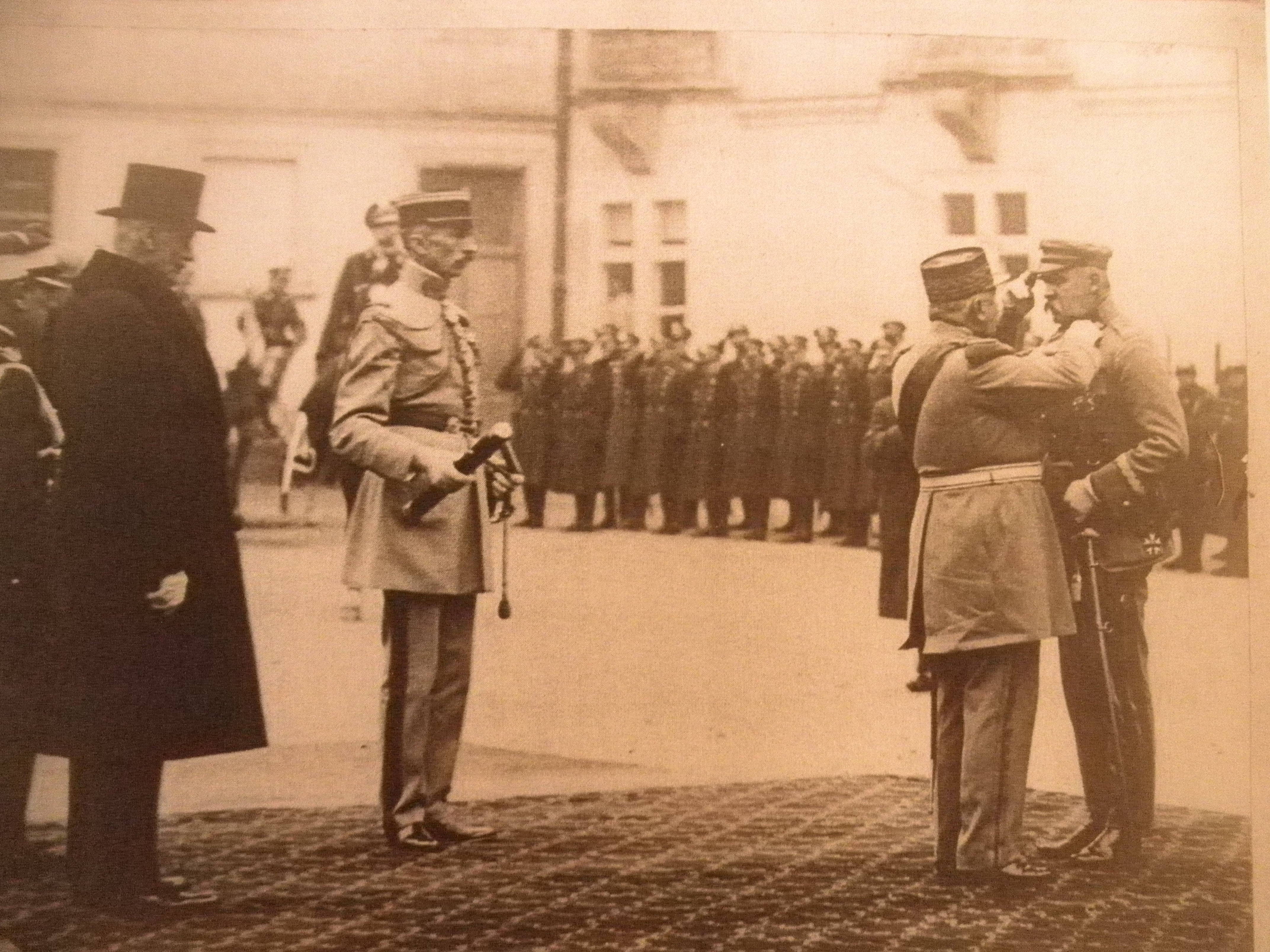 Guerre 14/18